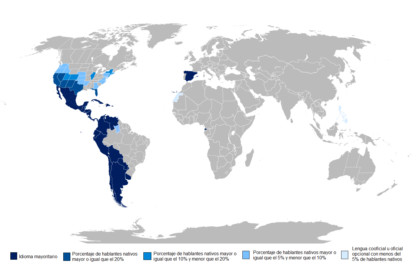 Mapa del idioma español en el mundo